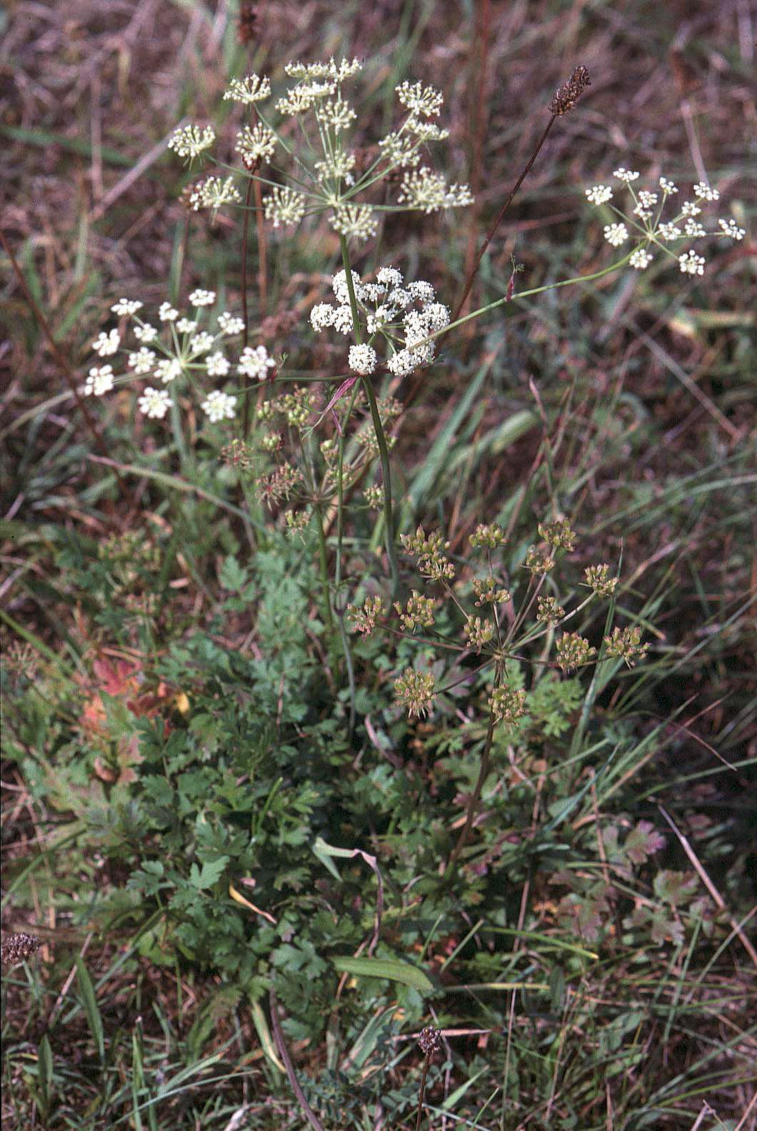 Peucedanum oreoselinum in Unterfranken